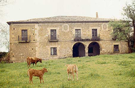 Fotograía del Palacio del Rebollín o de los Llanes